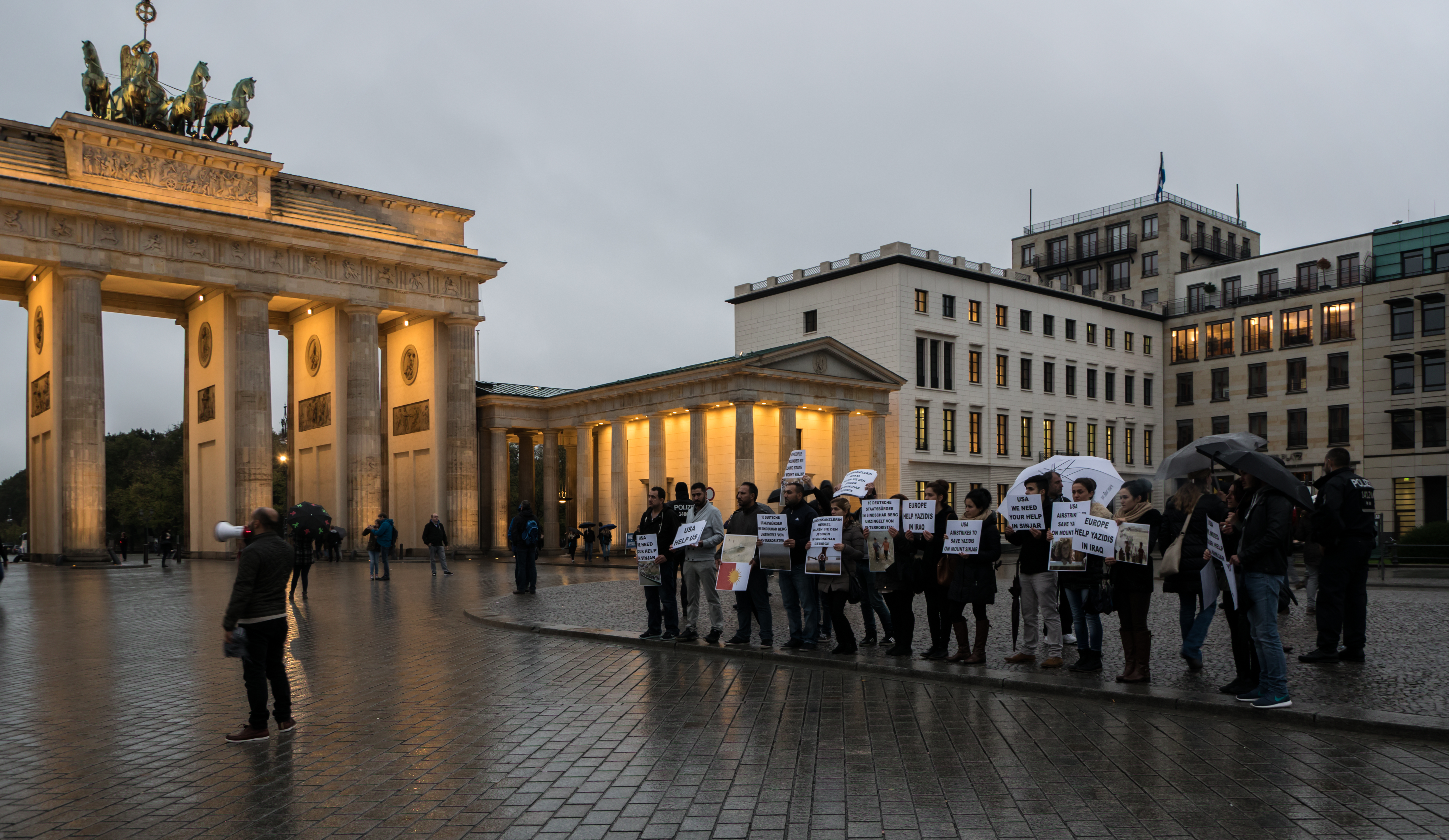 Demonstration von Jesiden vor der US-Amerikanischen Botschaft in Berlin am 22.10.2014